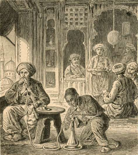 Osmanlı Döneminde Nargile